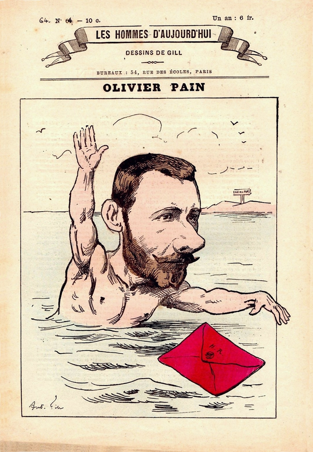 Olivier Pain (1845-1885). Caricature par André Gill pour le N° 64 des Hommes d'aujourd'hui, 1879